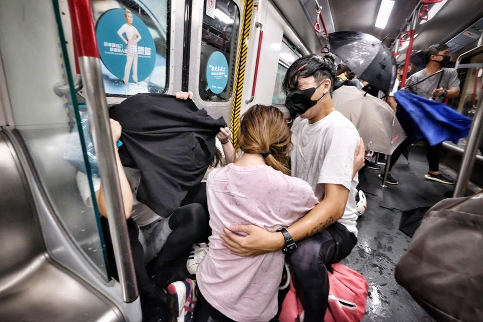 粵語: 831太子站襲擊之中，遇襲市民相擁而無助。